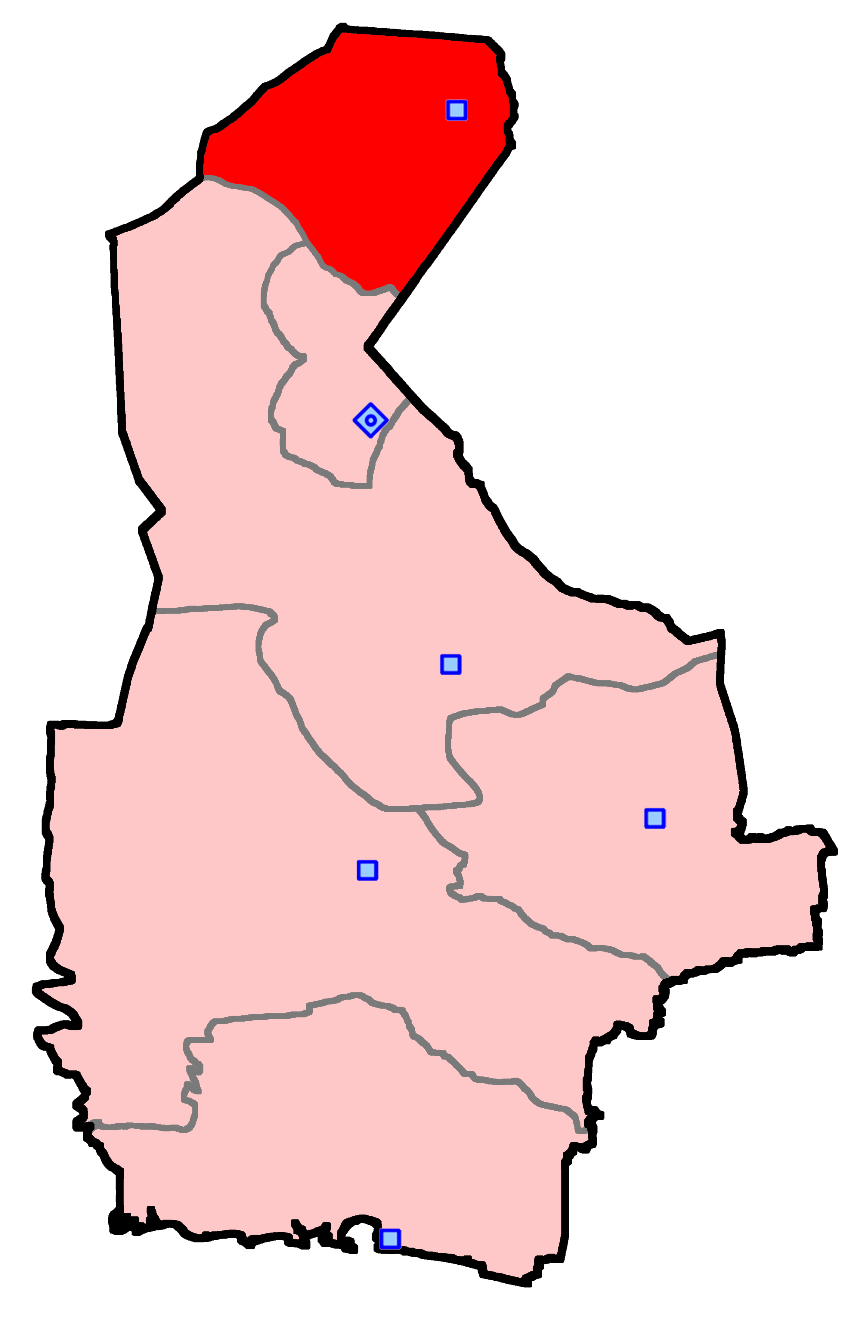 حوزه زابل برای انتخابات مجلس شورای اسلامی